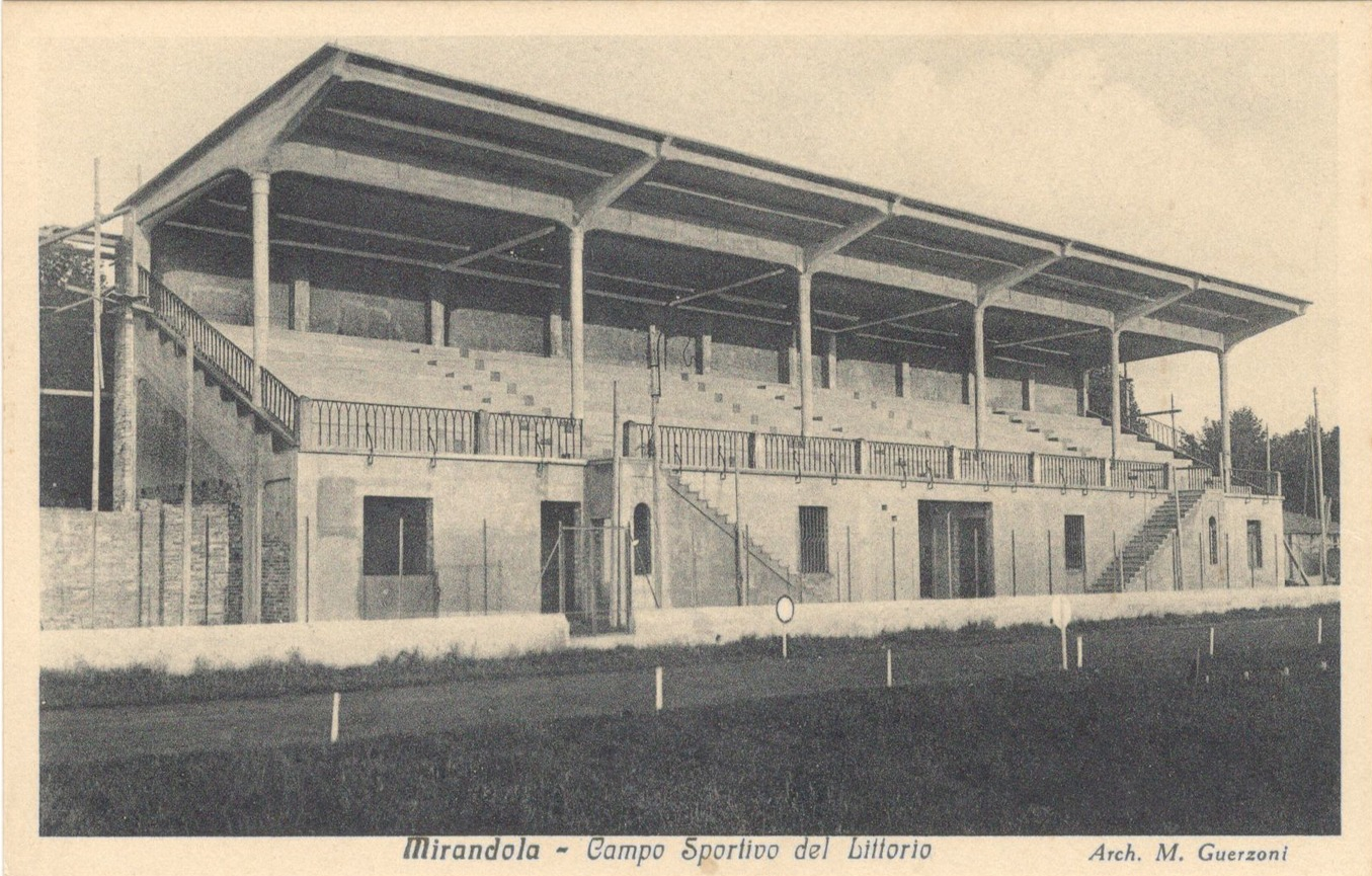 Mirandola - Campo Sportivo del Littorio (attuale Stadio Libero Lolli)